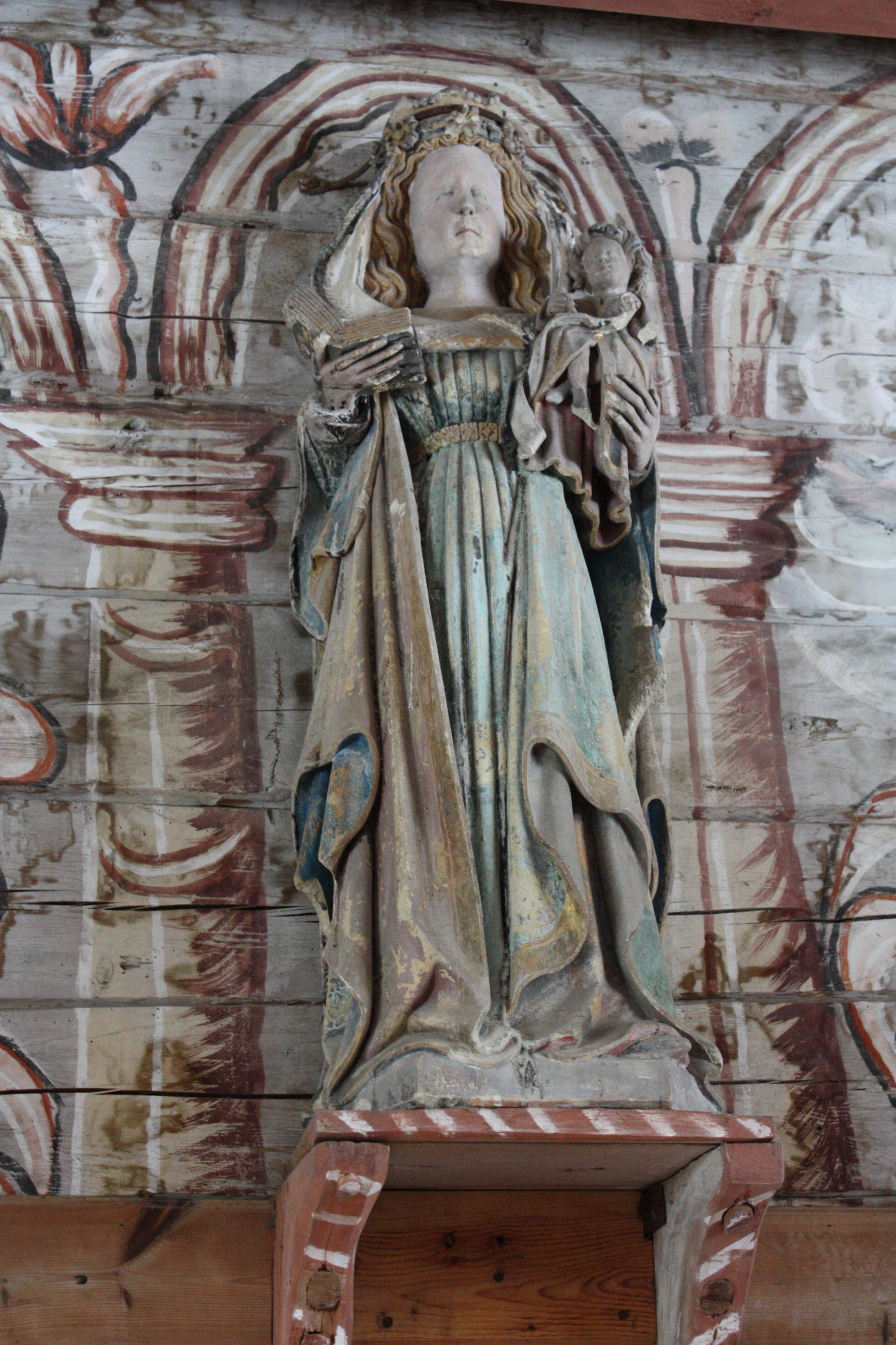 Bilde av madonnastatuen i Holdhus Kirke.